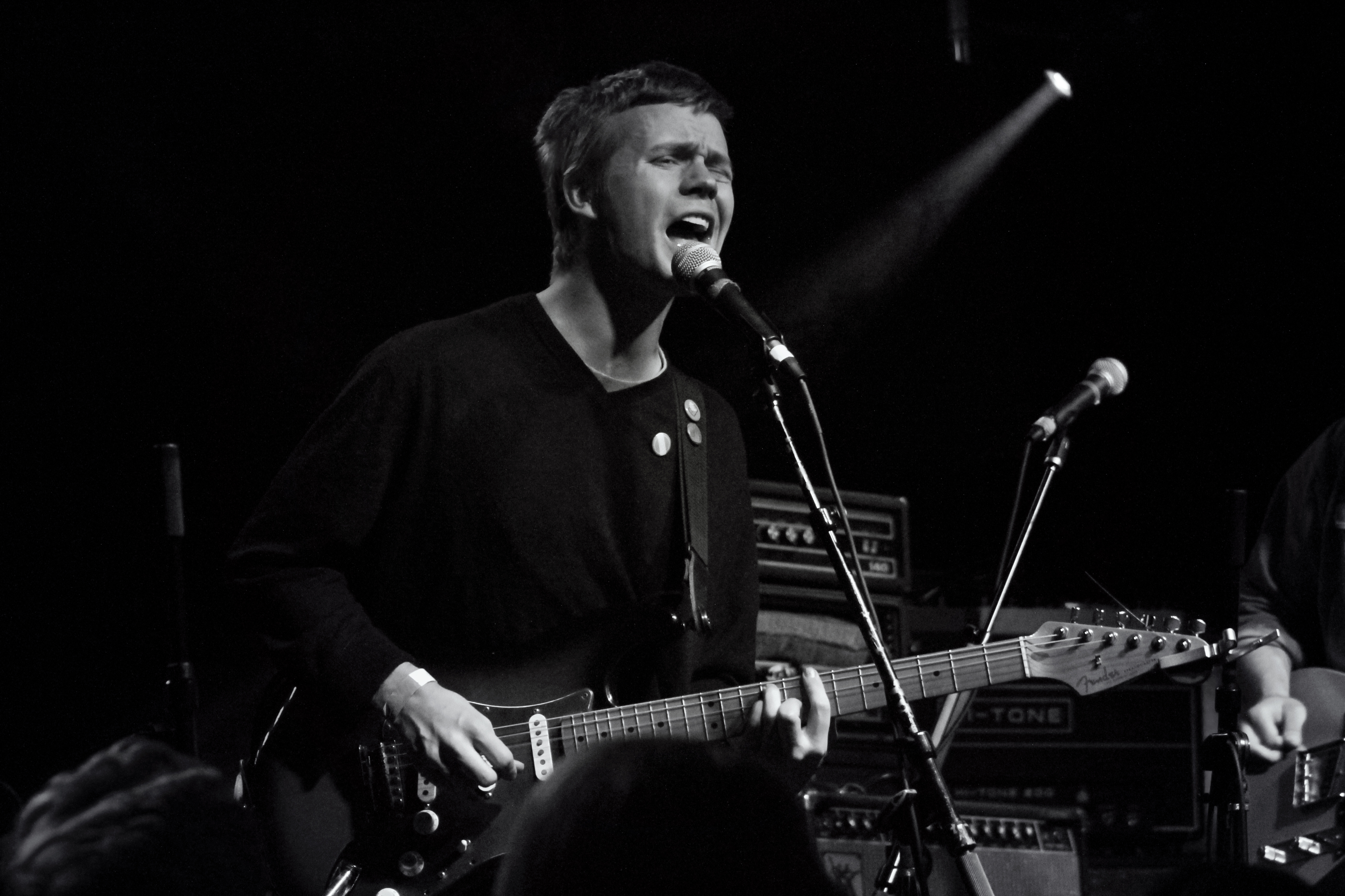 Pinegrove